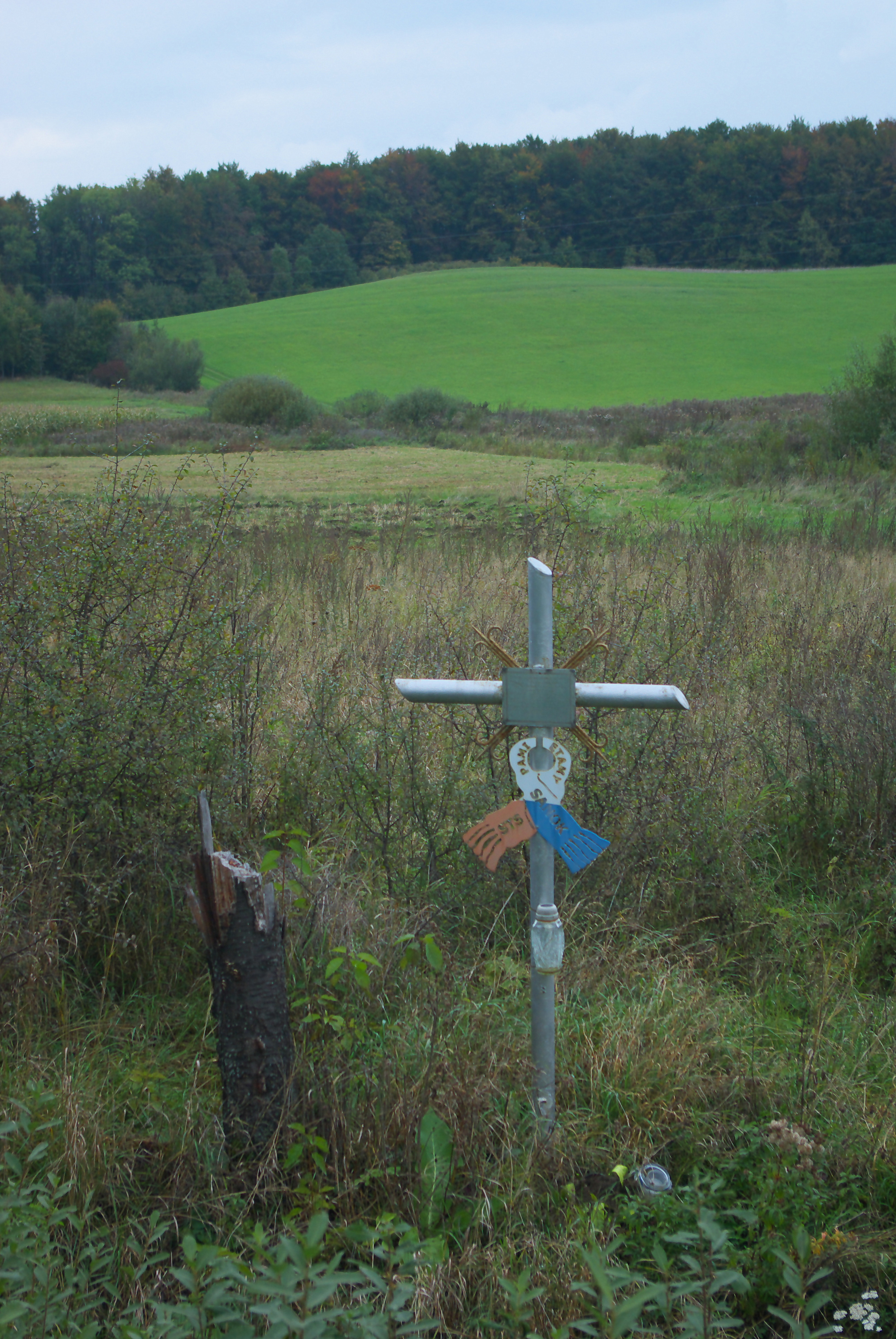 Gniewoszówka - krzyż przydrożny w miejscu wypadku drogowego autokaru wiozącego drużynę hokeja na lodzie STS "Autosan" Sanok z 23 stycznia 1995, w którym poniosły śmierć trzy osoby, w tym hokeista Piotr Milan.